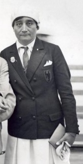 Sport. Olympische Spelen1928 Amsterdam, Nederland. Schermen, dames, floret: Duitse medaillewinnaars Helene Mayer (links, goud) en Olga Oelkers (brons)..